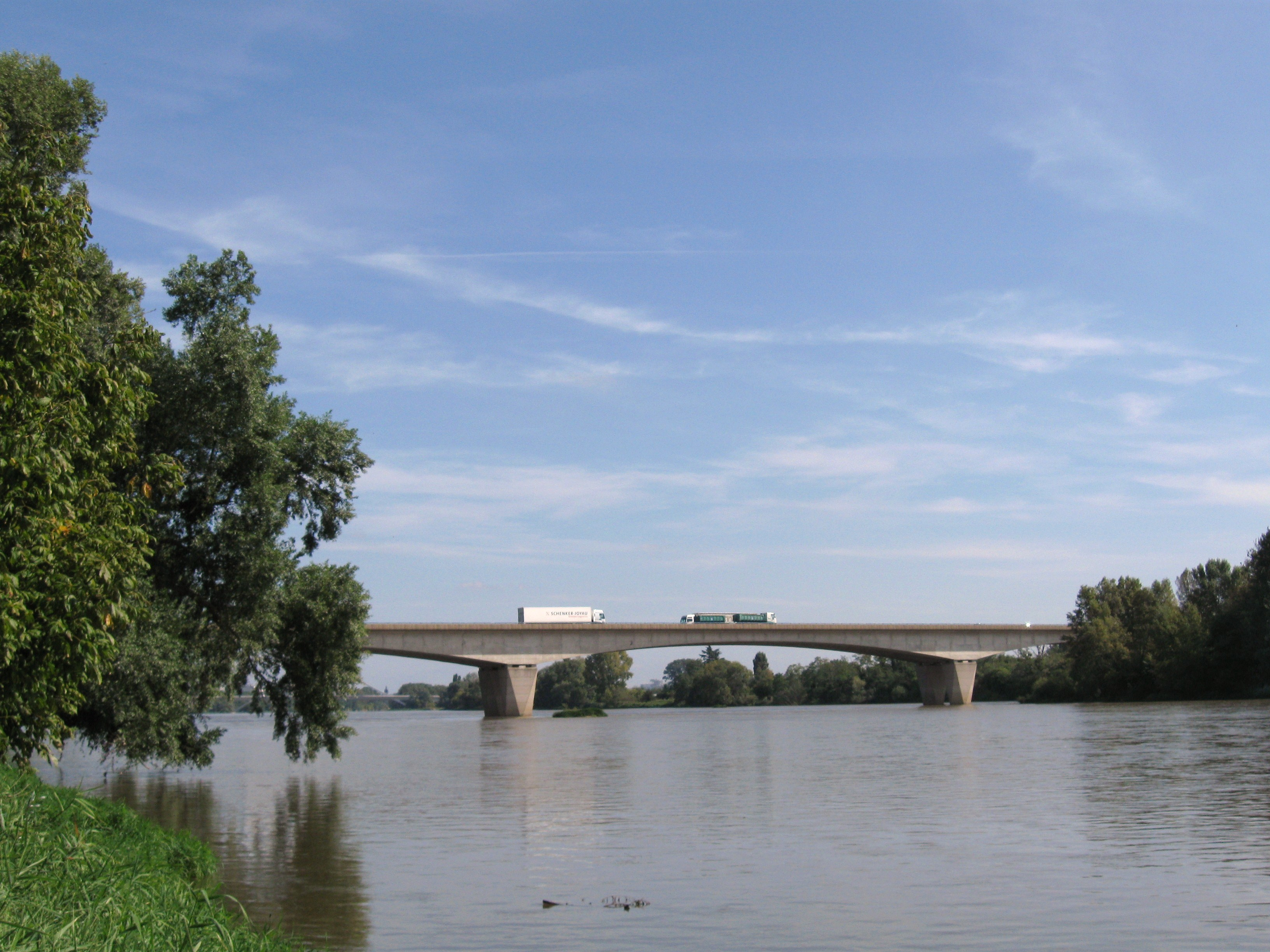 Pont sur la Loire de l'autoroute A71, La Chapelle-Saint-Mesmin, Loiret, France